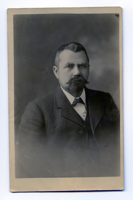 Johan Pitka